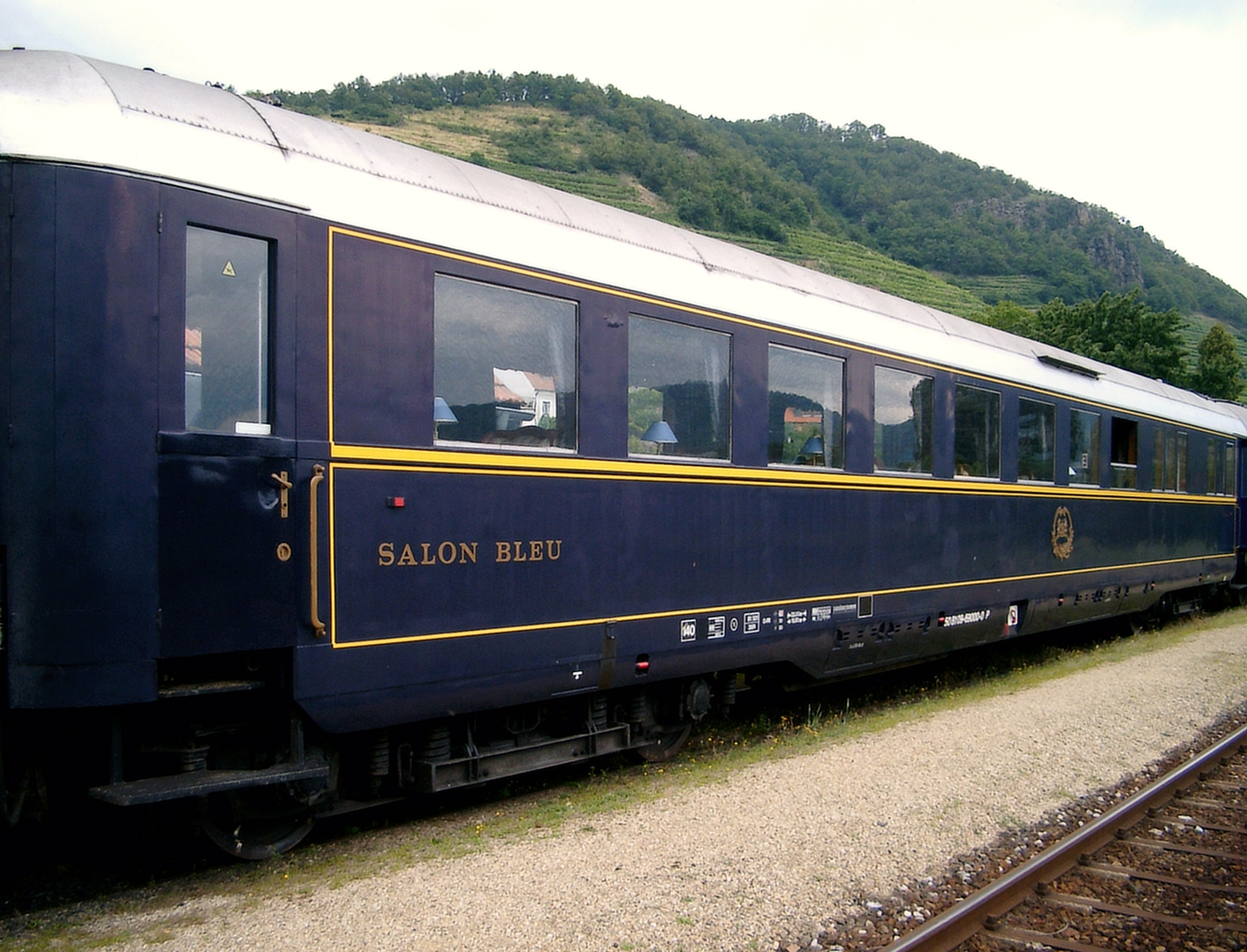 Restaurantsvoiture vun der Compagnie des Wagons-Lits.